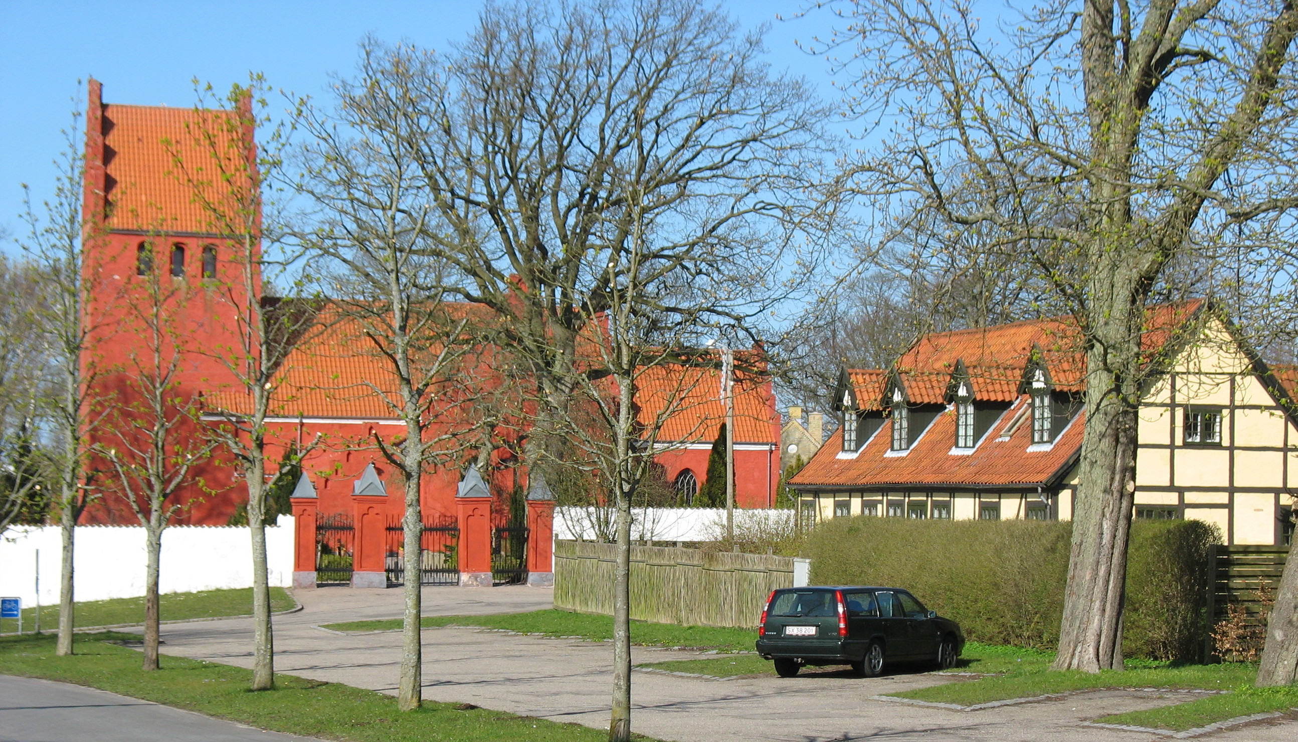 Gammel Tølløse